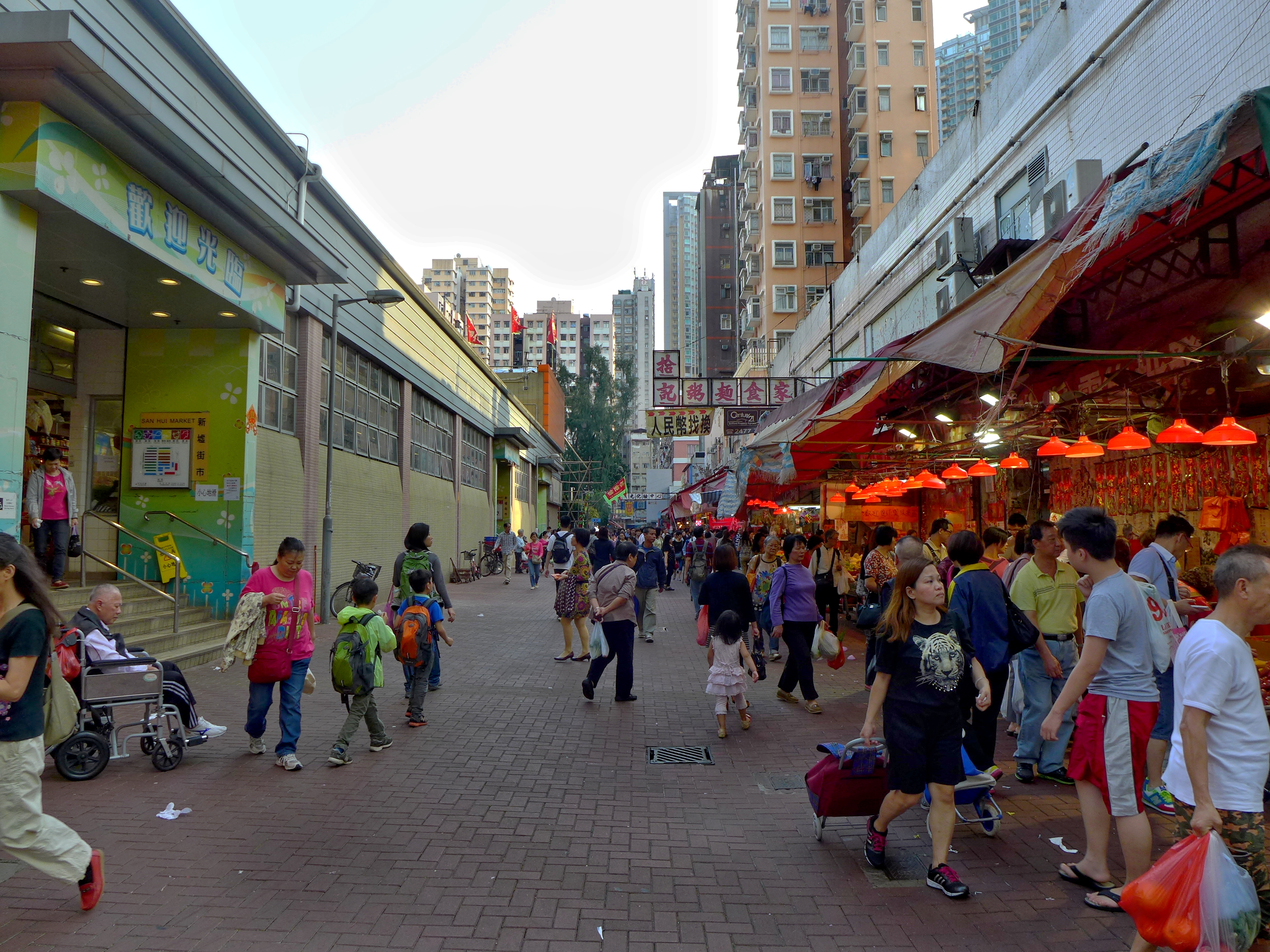 Tuen Mun San Hui Kai Man Path